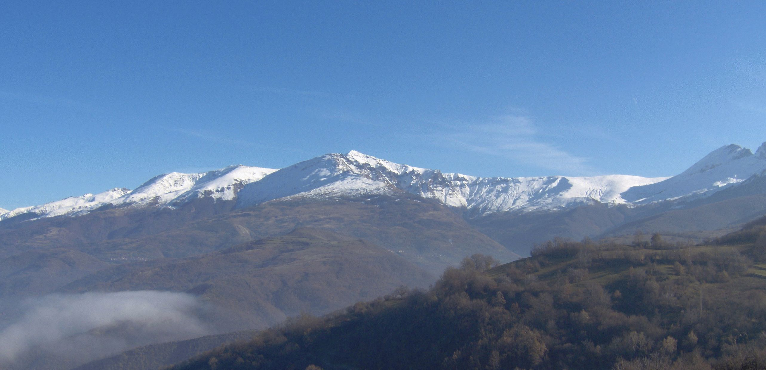 Pogled na Crni Vrh.